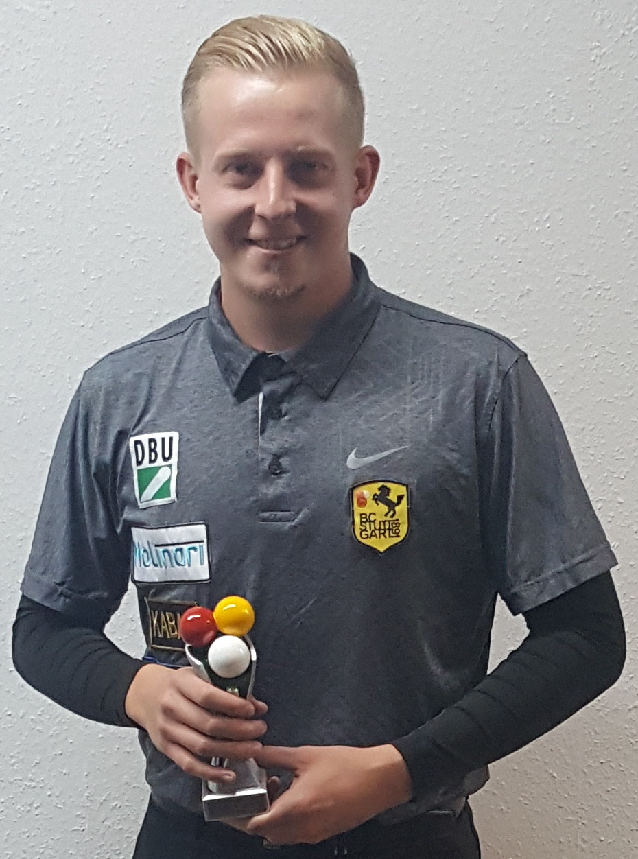 siehe Dateiname